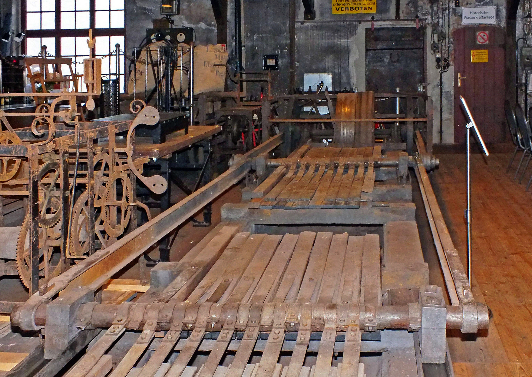 Funktionsfähige Reibestrecke zur Herstellung von Eisenpulver im Museum Eisenmühle Oderwitz